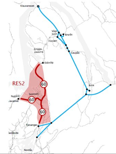 Tenkt vei fra Fjøsanger mot Arna